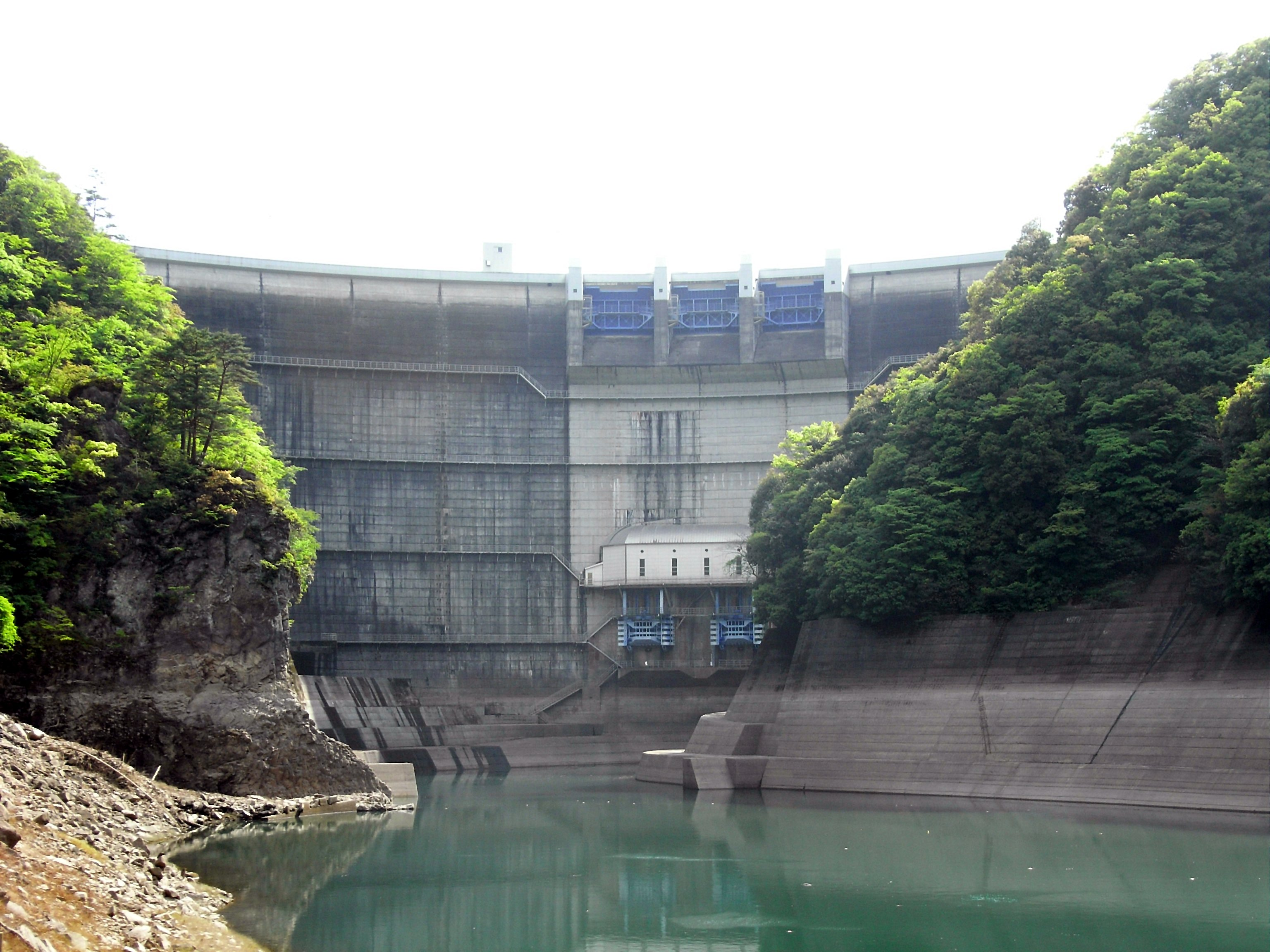 Dam